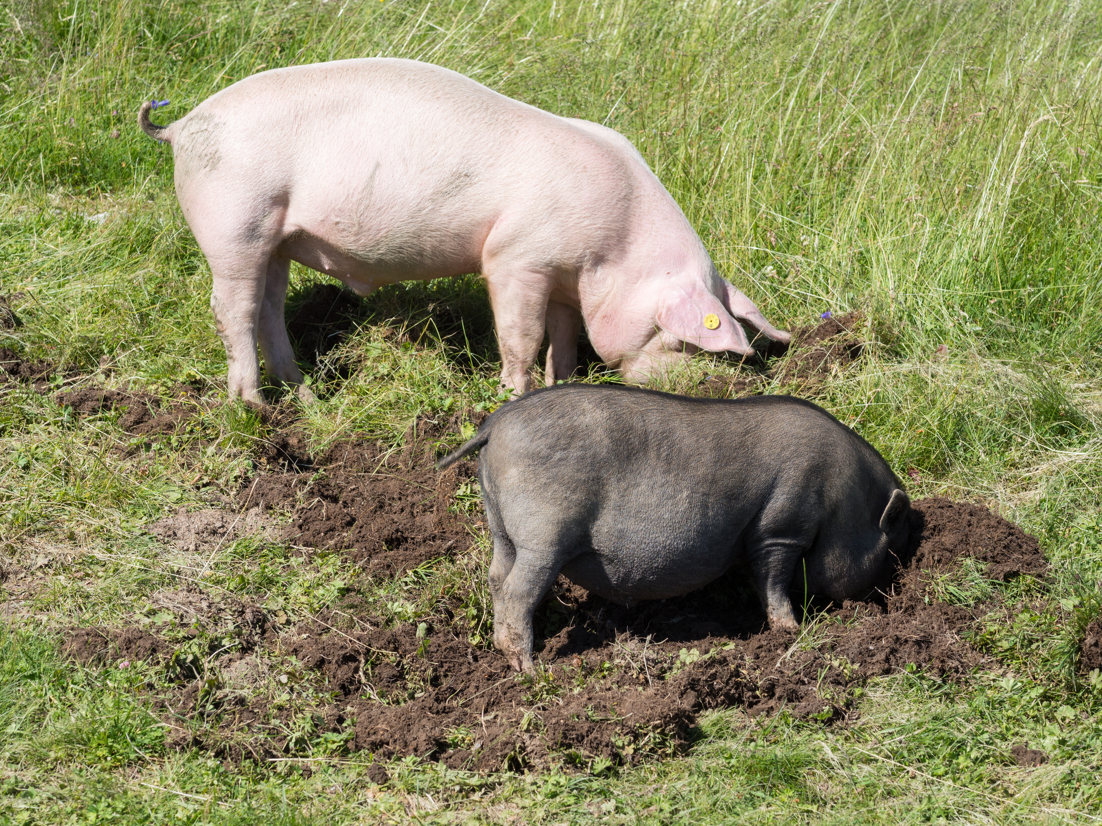 Hängebauchschwein und Hausschwein beim Wühlen in einer Bergwiese bei der Klausner Hütte in den Sarntaler Alpen in Südtirol